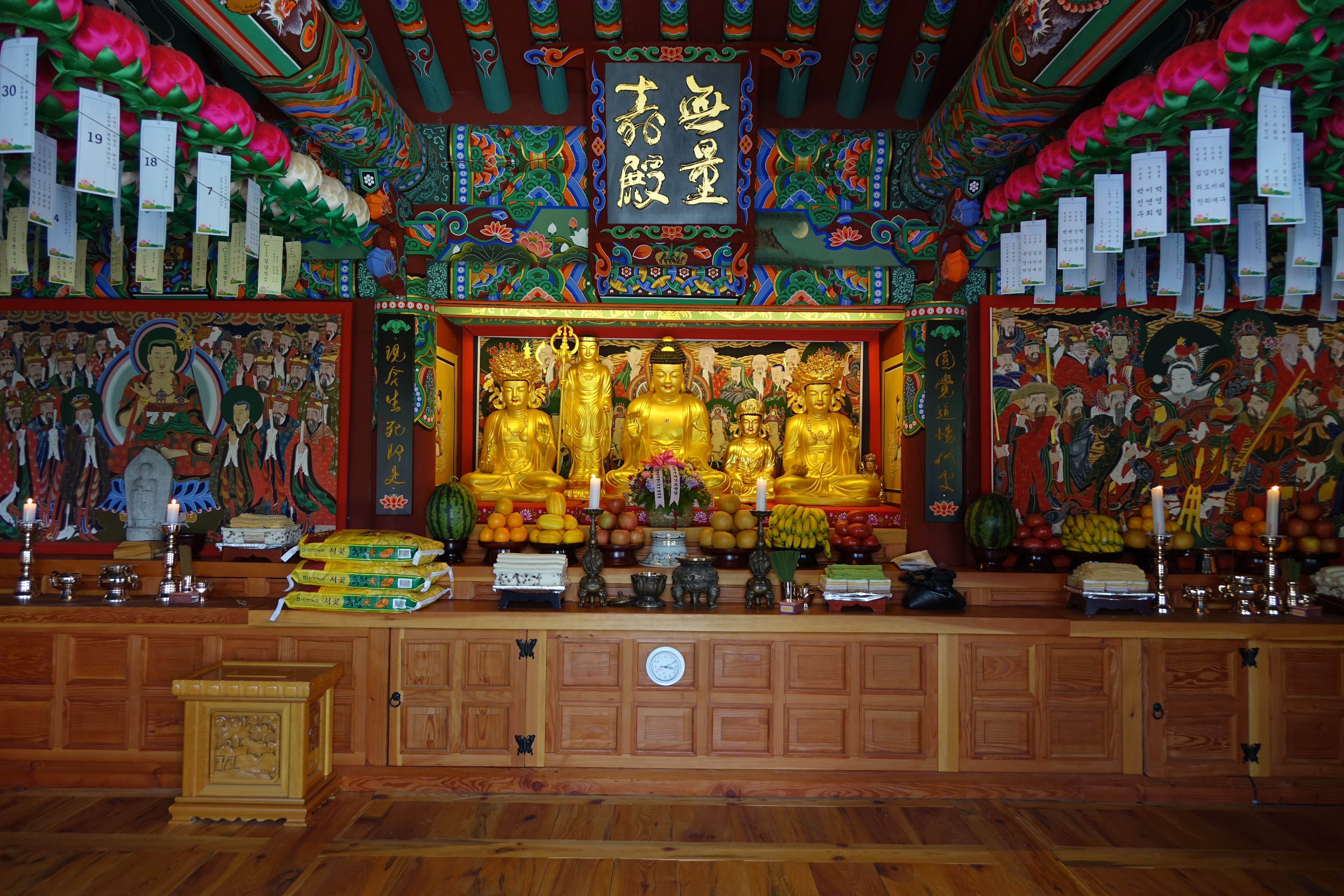 최광모 촬영 사진 (Photos taken by Choe Kwangmo)